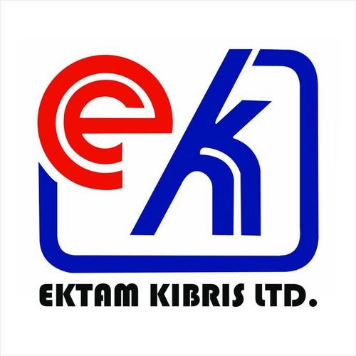 logo